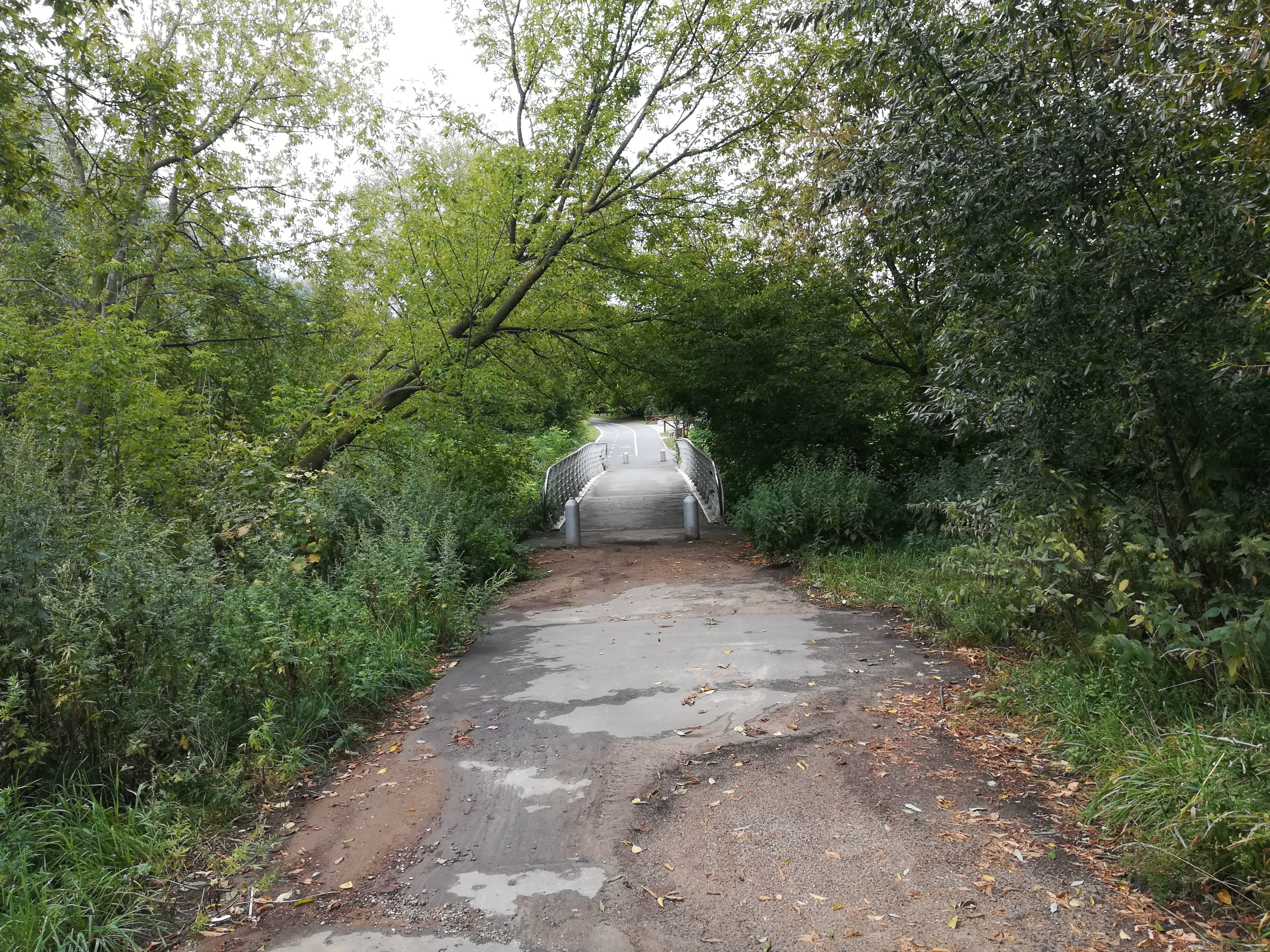 Парк 50-летия Октября. Участок бывшего Боровского шоссе